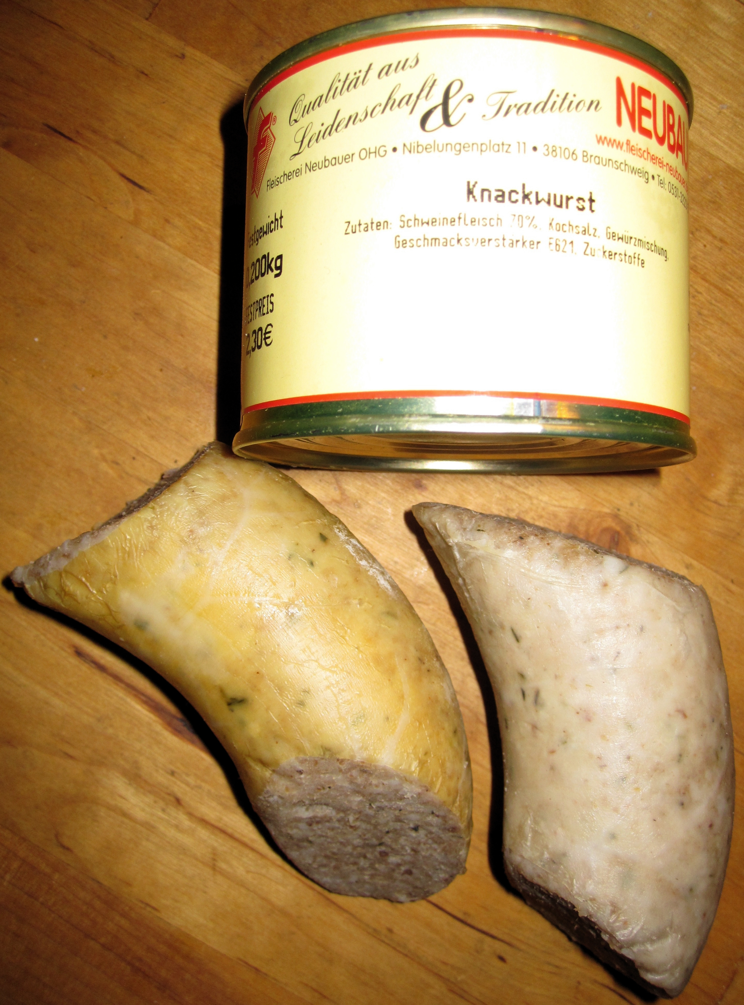 Für die Stadt und die Region Braunschweig typische Knackwurst – in einer Dose konserviert (oben) sowie, jeweils im Naturdarm, als Frischwurst, geräuchert (unten links) und ungeräuchert (unten rechts)